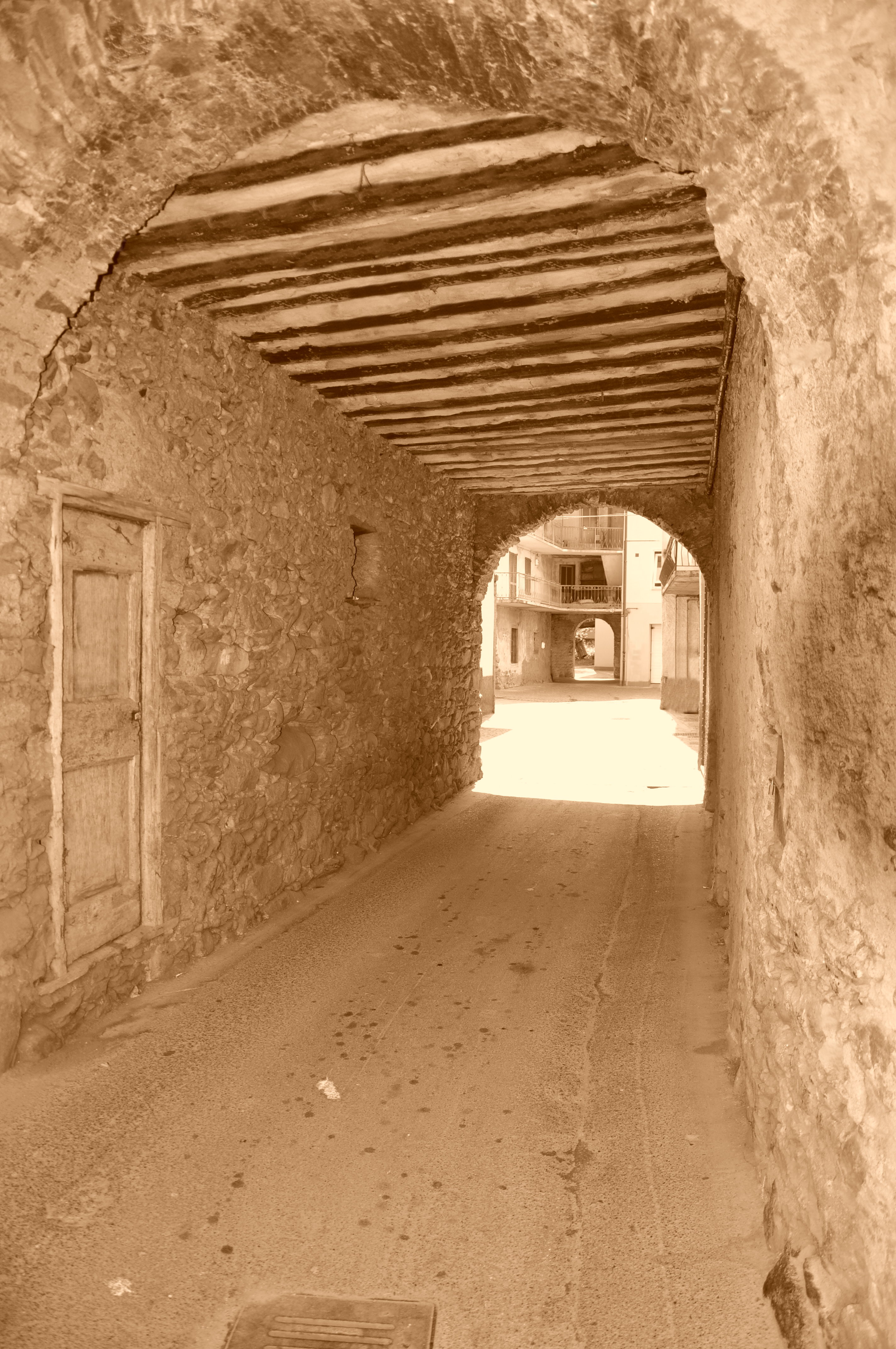 Piccola strada di Sacca che passa sotto struttura ad archi di pietra e travi di legno.